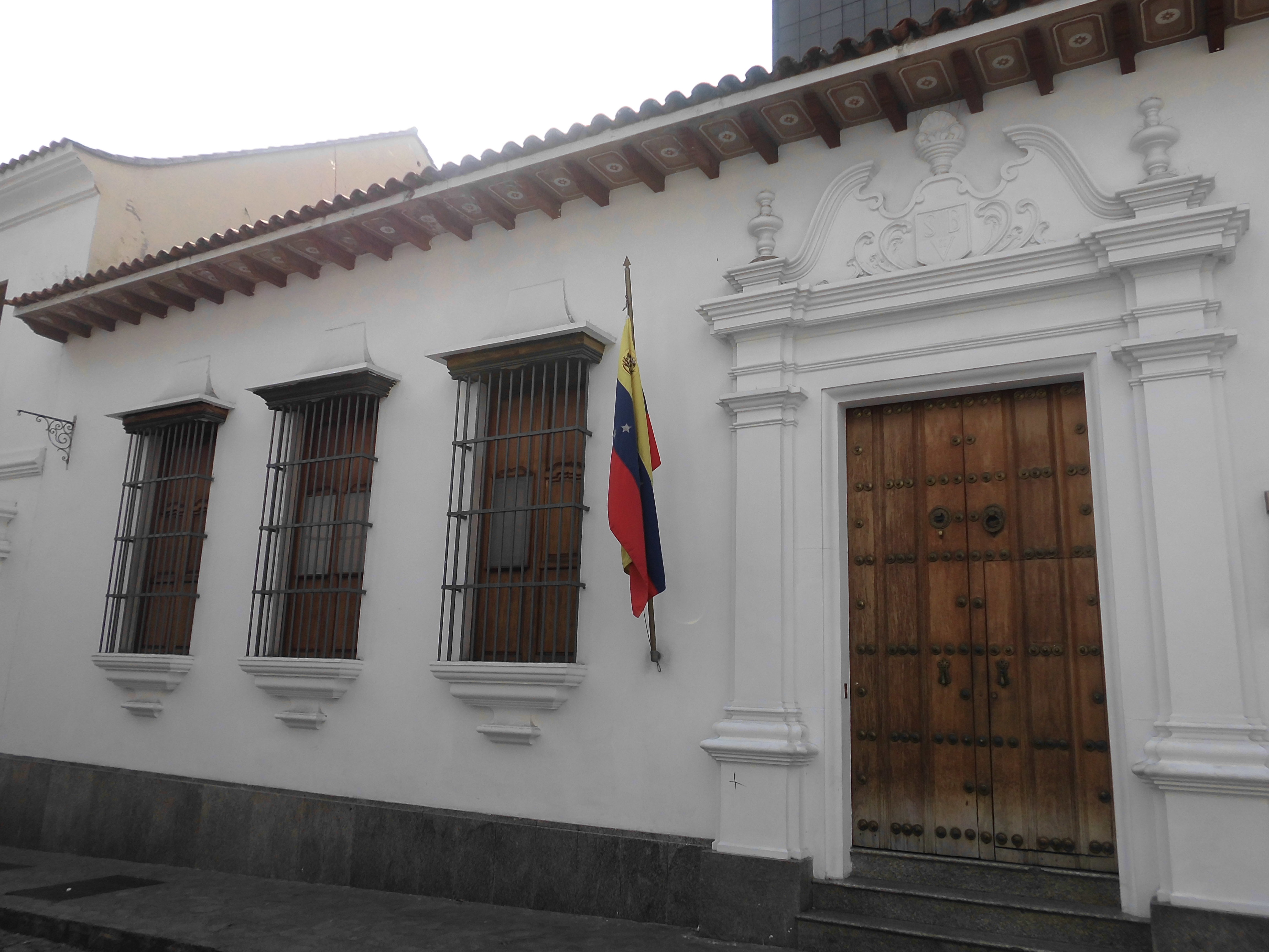 Puerta Principal de la Sociedad Bolivariana y su lado izquierdo